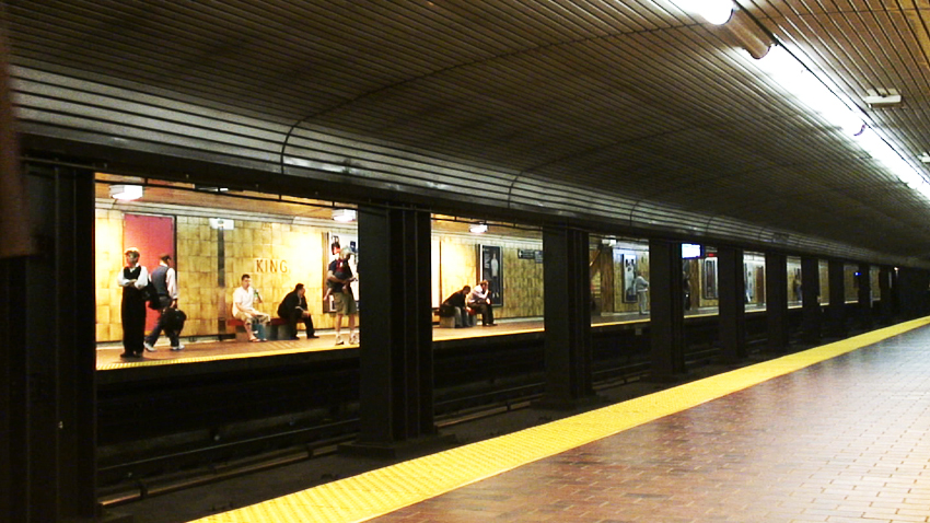 Ce quai où n'accostent pas les bateaux...